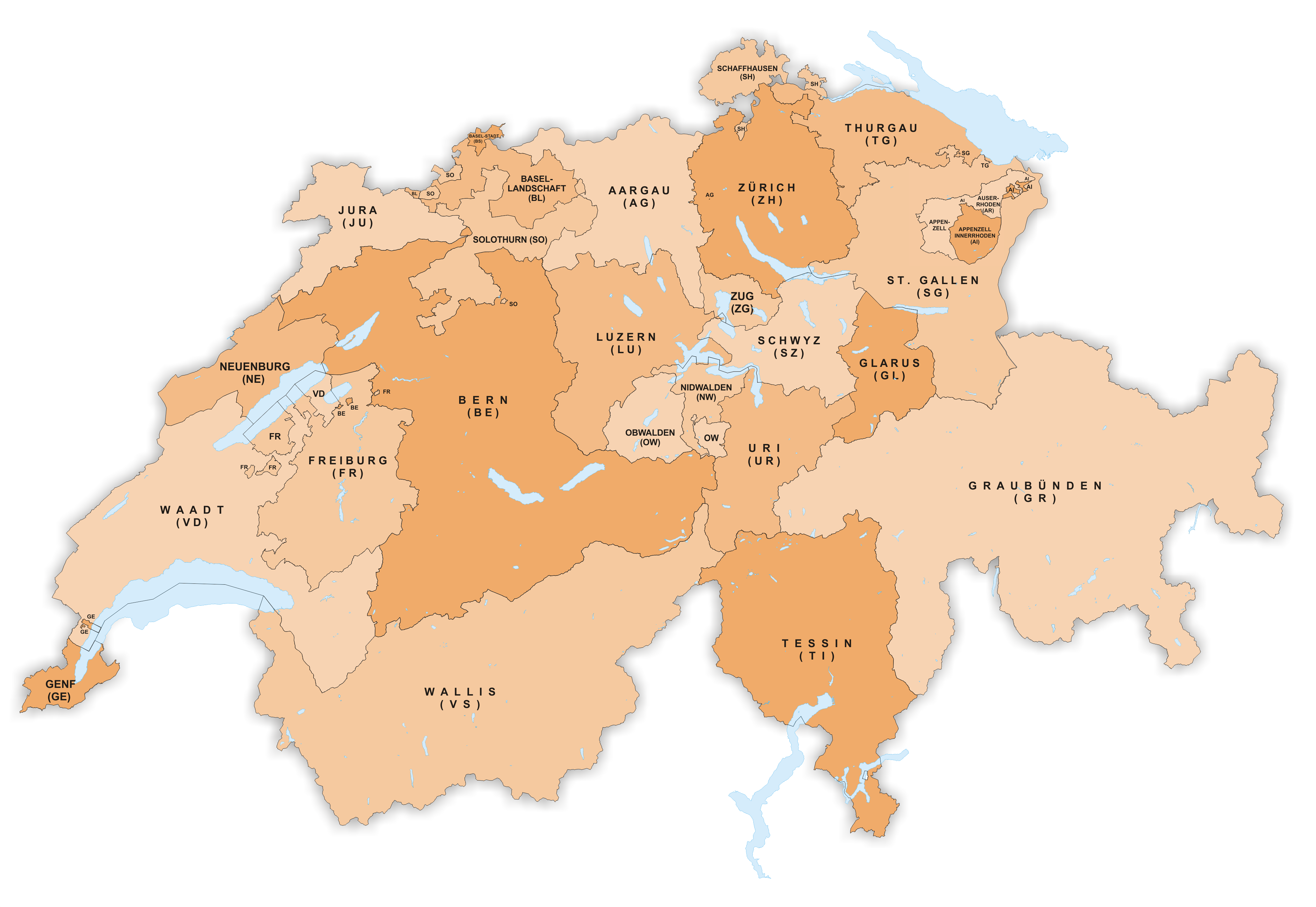 Cantons in Switzerland